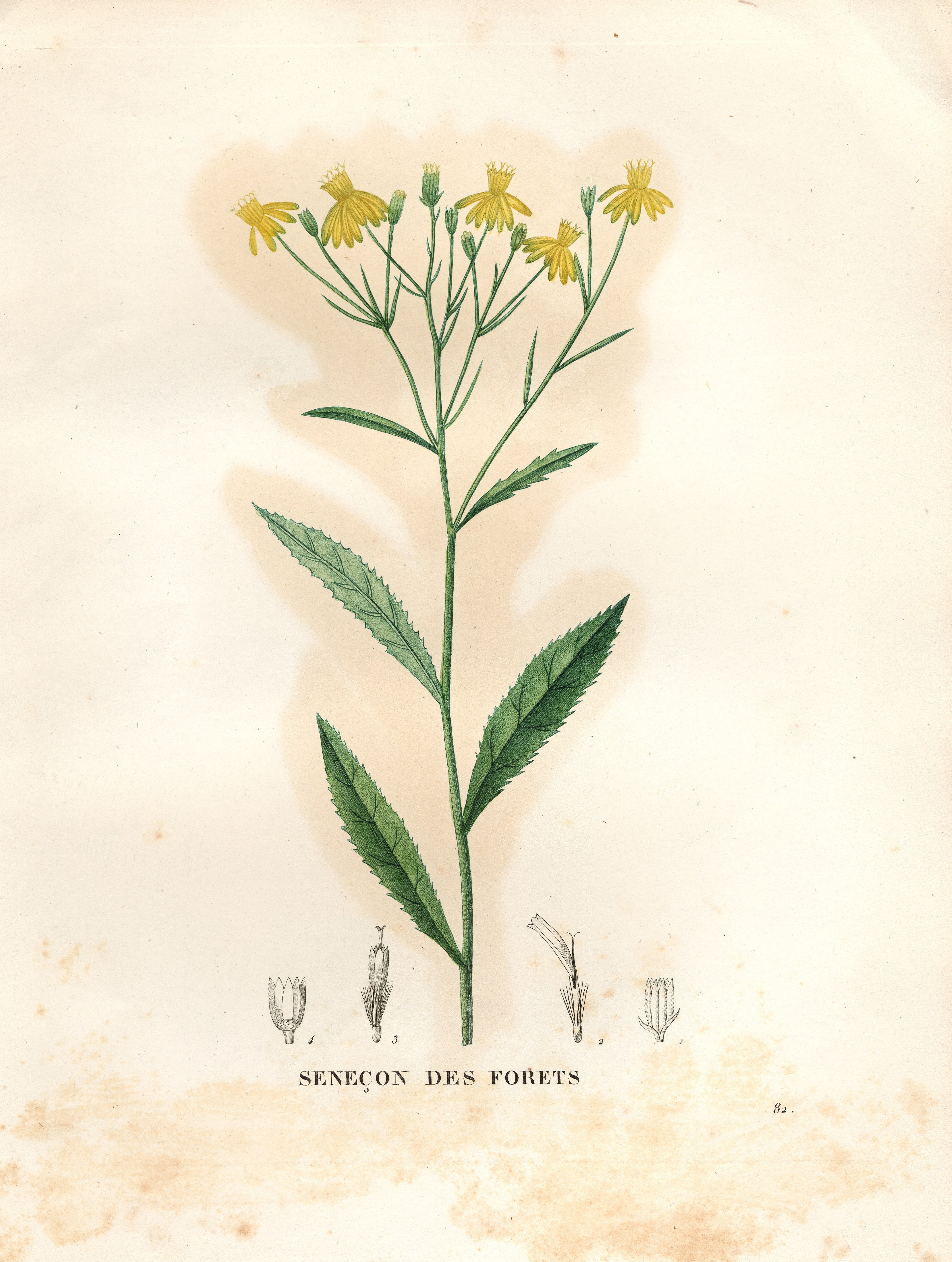 Legende: Oberer Teil der Pflanze. 1 Hülle, Blüten entfernt. 2 Strahlenblüte. 3 Röhrenblüte. 4 Körbchenboden, Hülle teilweise und Blüten entfernt.